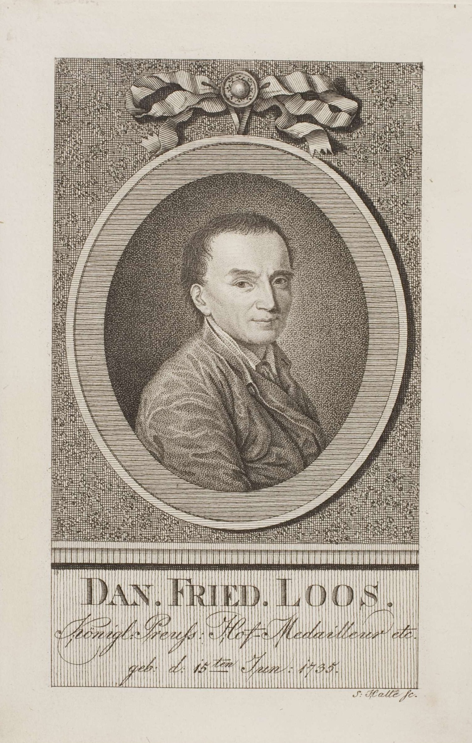 Portrait des Daniel Friedrich Loos (1735-1819), Medailleur und Stempelschneider in Berlin. Stich durch Johann Samuel Ludwig Halle.